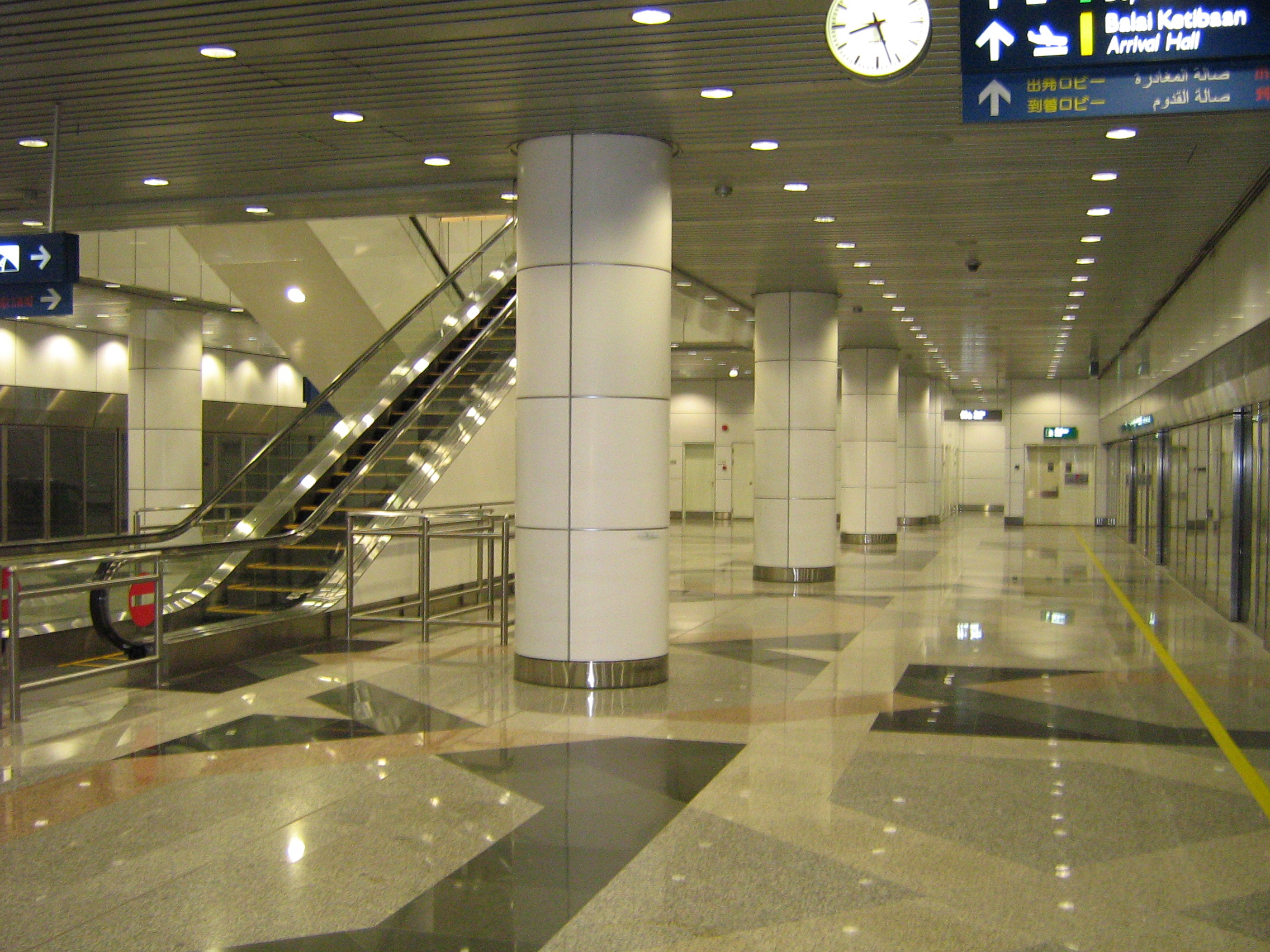 Bahnhof in KLIA